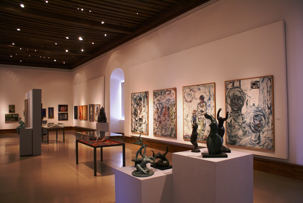 El Centro Cultural Clavijero se ubica en la ciudad de Morelia, Michoacán, México, es un centro cultural público dedicado albergar exposiciones temporales de instituciones culturales públicas y privadas. El recinto tiene su sede en lo que fue el antiguo Colegio de la Compañía de Jesús, de estilo barroco del siglo XVIII.